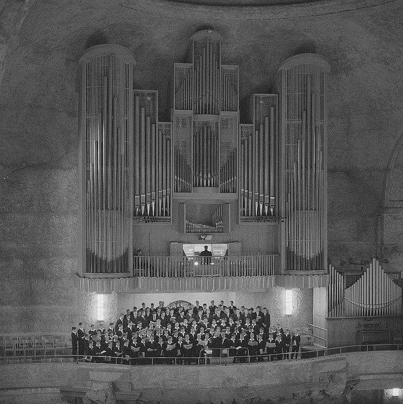 Original image description from the Deutsche FotothekDresden. Kreuzkirche, Inneres, Orgel mit Kreuzchor